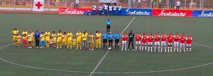 Atlético Bucaramanga Vs Santa Fe - Junio 15 de 2017 - Semifinales Liga Águila Femenina